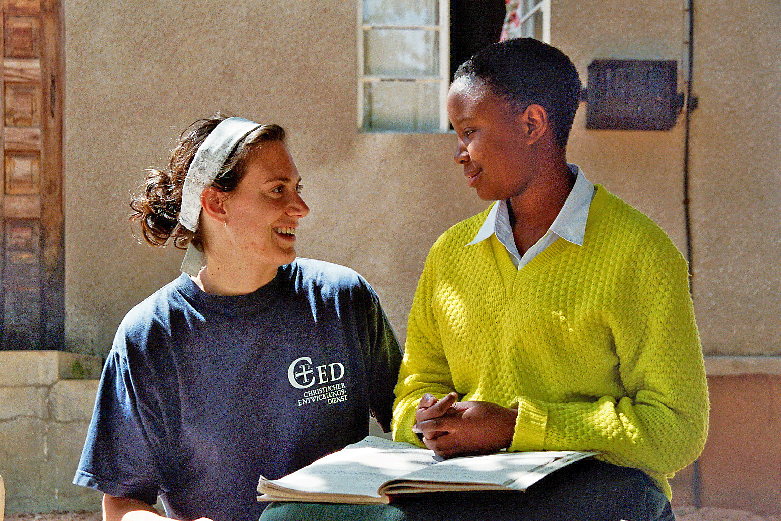 CED-Helfer mit Schülerin in Siuyu, Tansania